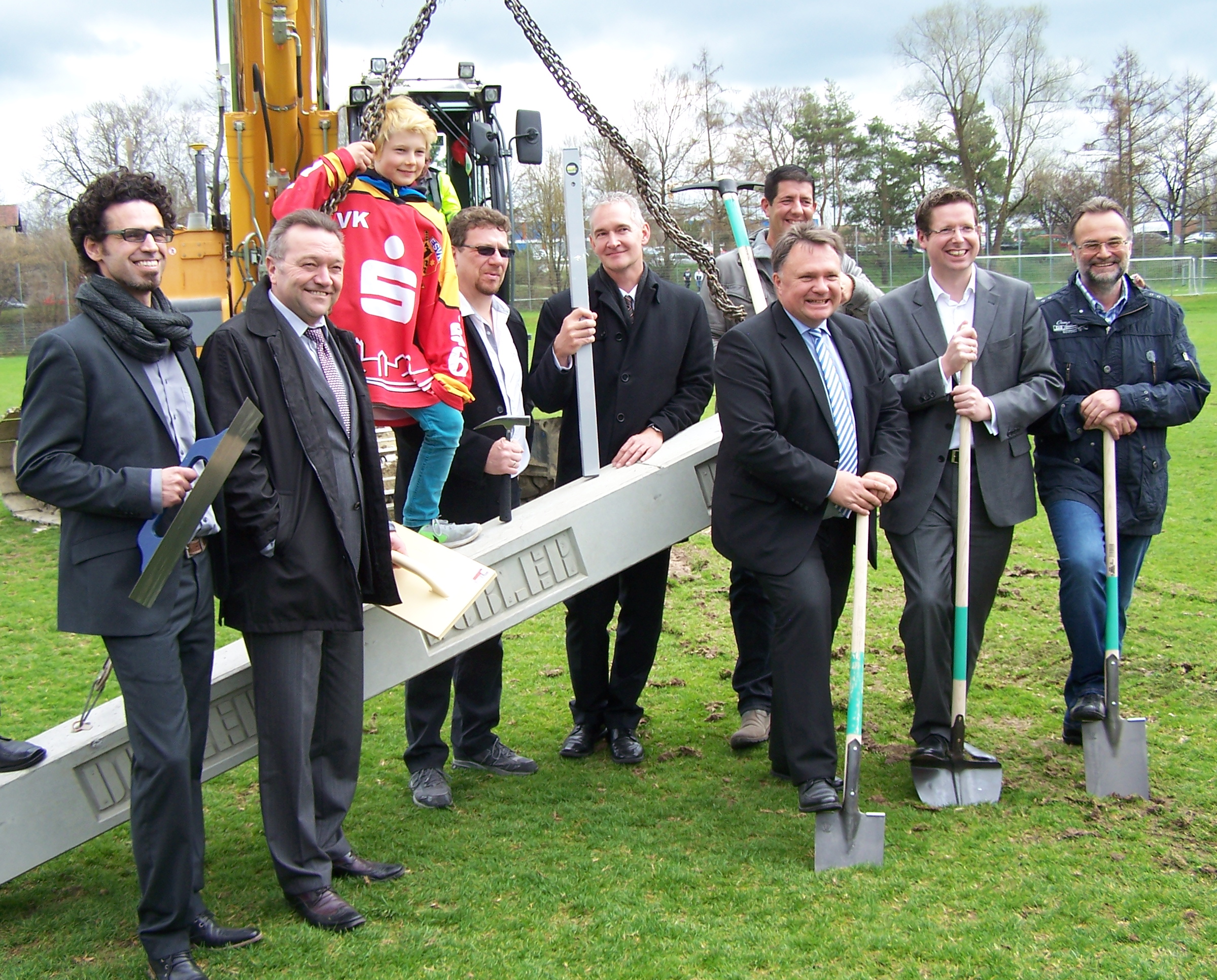 Mit dem ersten symbolischen Spatenstich hat am 6. April 2016 der Bau des neuen Eisstadions in Kaufbeuren begonnen.